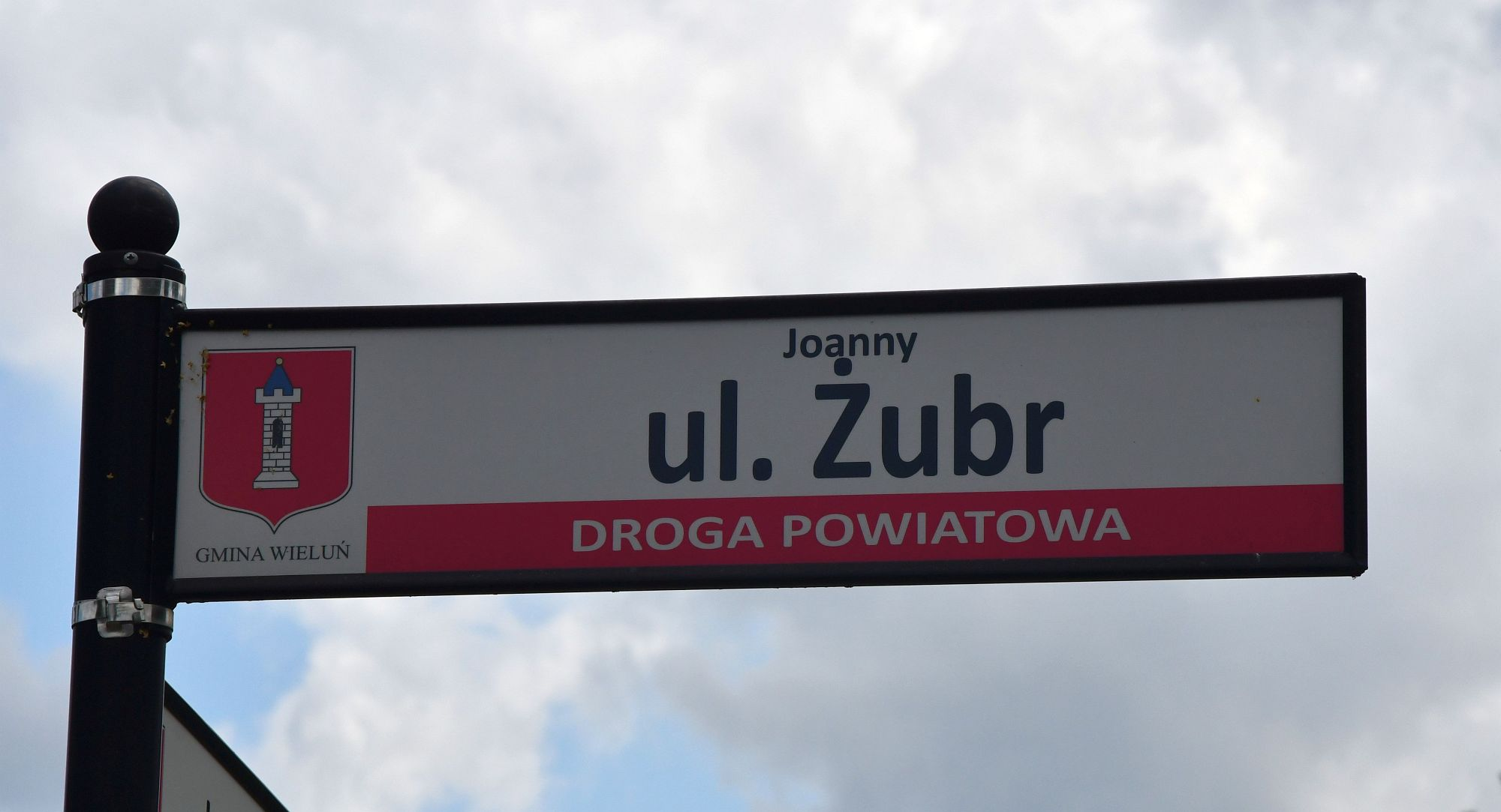 Ulica J. Żubr, tabliczka